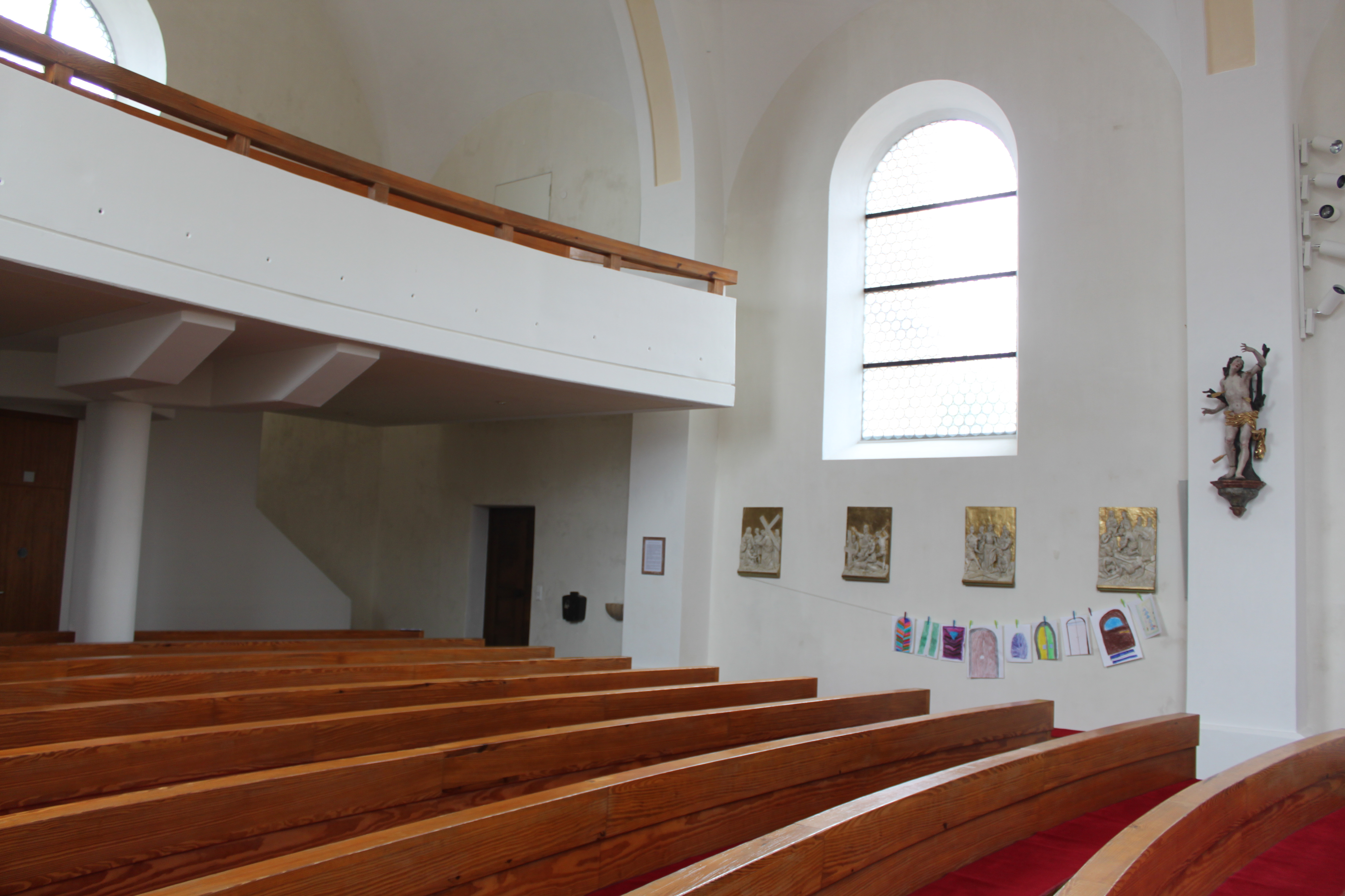 Kath. Pfarrkirche hl. Stephanus und Friedhof, seitlich im Langhaus zur Empore der Moderne, geschwungene Kirchenbänke der Moderne ohne Mittelgang